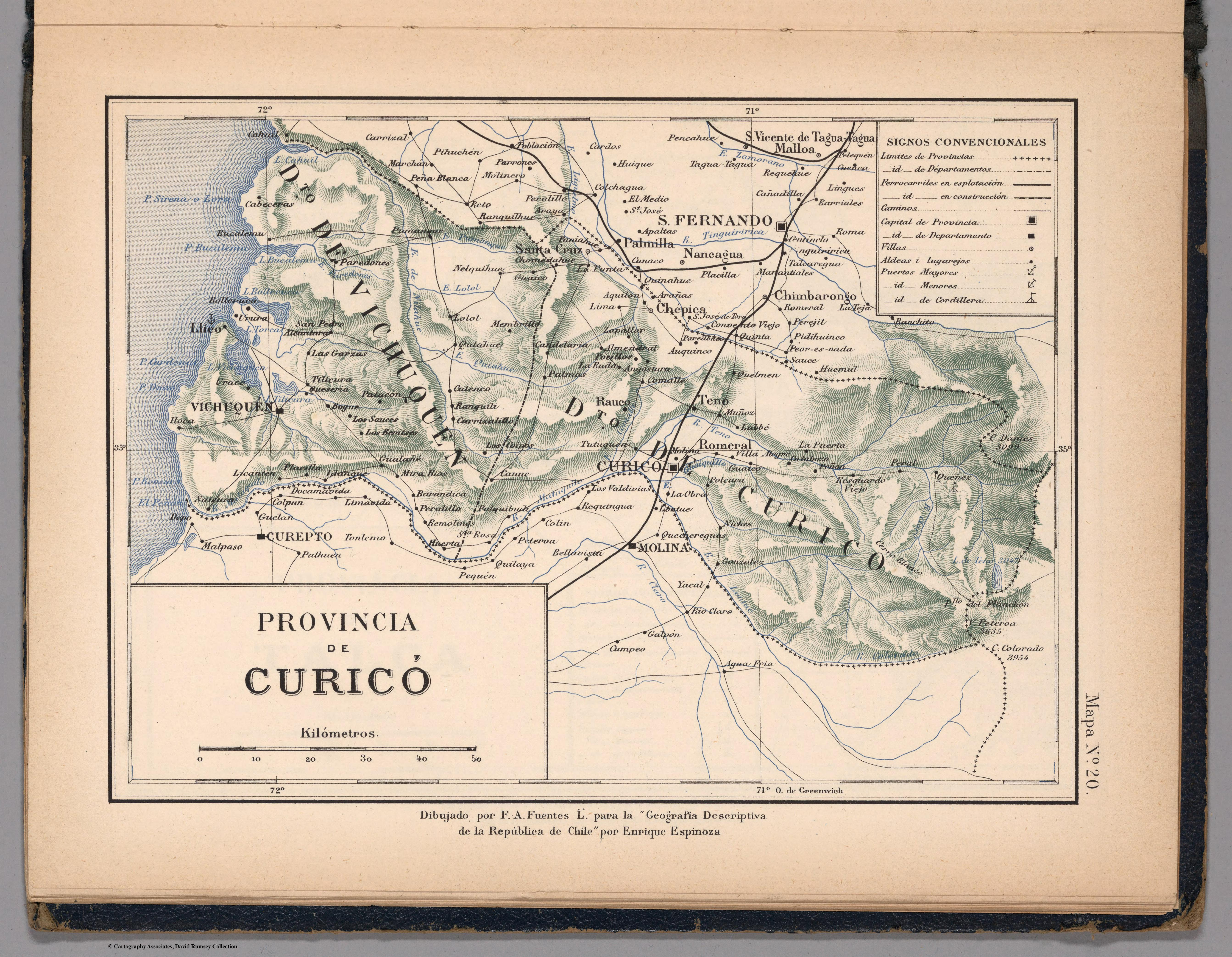 Atlas de Chile Arreglado para la Jeografia Descriptiva de la Republica de Chile por Enrique Espinoza.